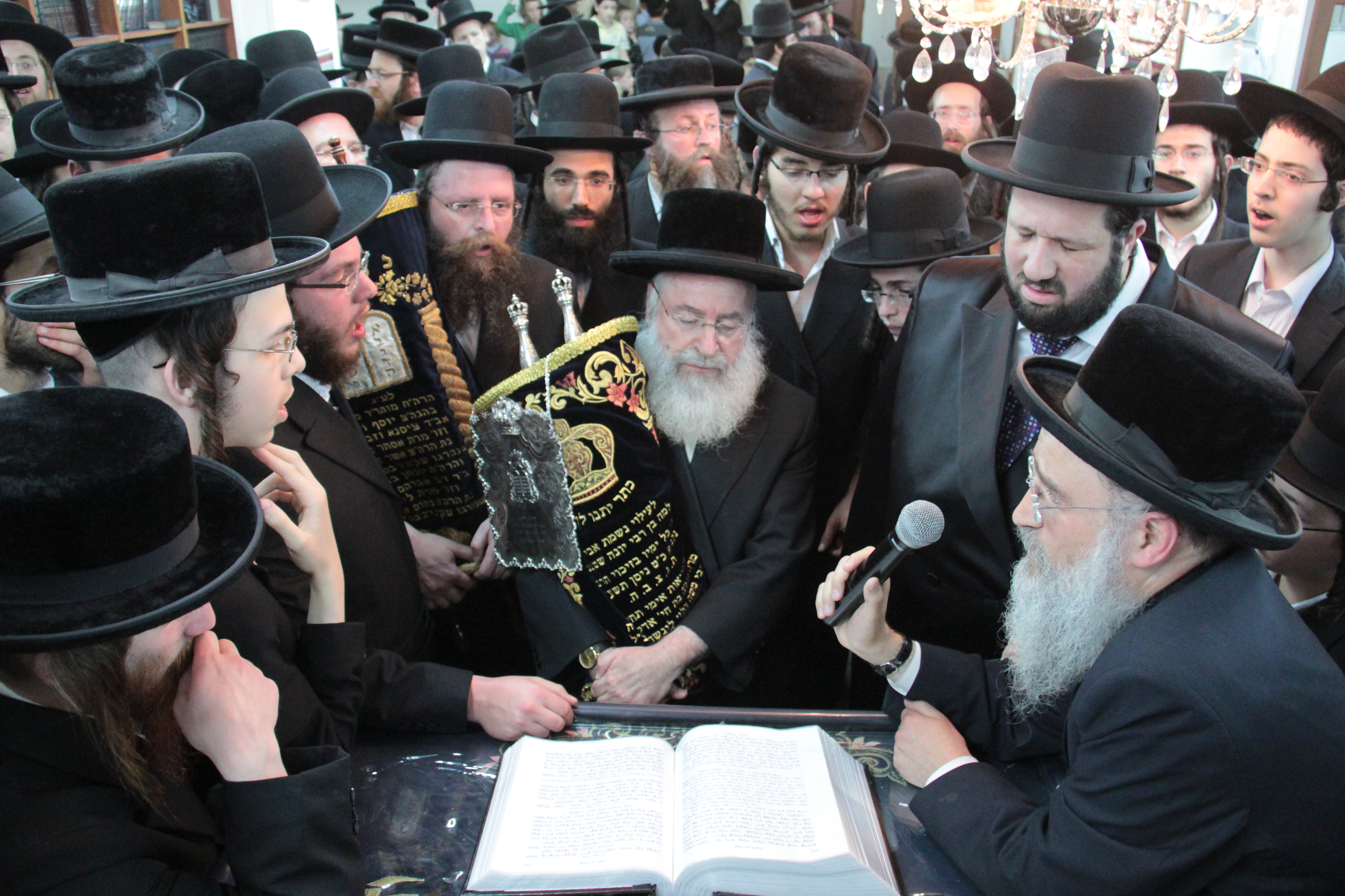 Sefer Torah in memory of Rabbi Shlomo Shtenzel in Beitar Illit Featuring Rabbi Asher Weiss Rabbi yonatan Shtencel